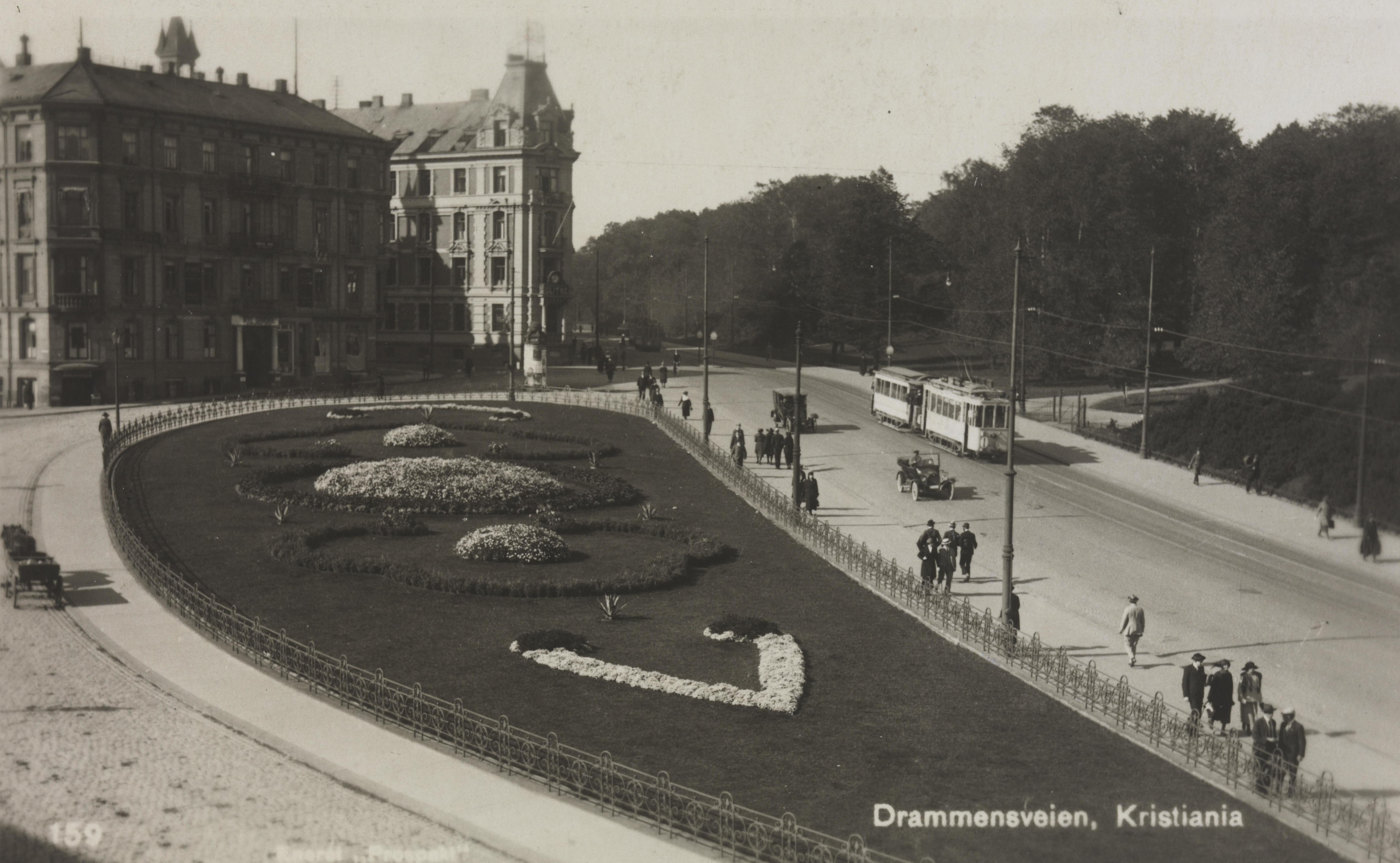 Bildet er hentet fra Nasjonalbibliotekets bildesamling Drammensveien, Oslo, Oslo